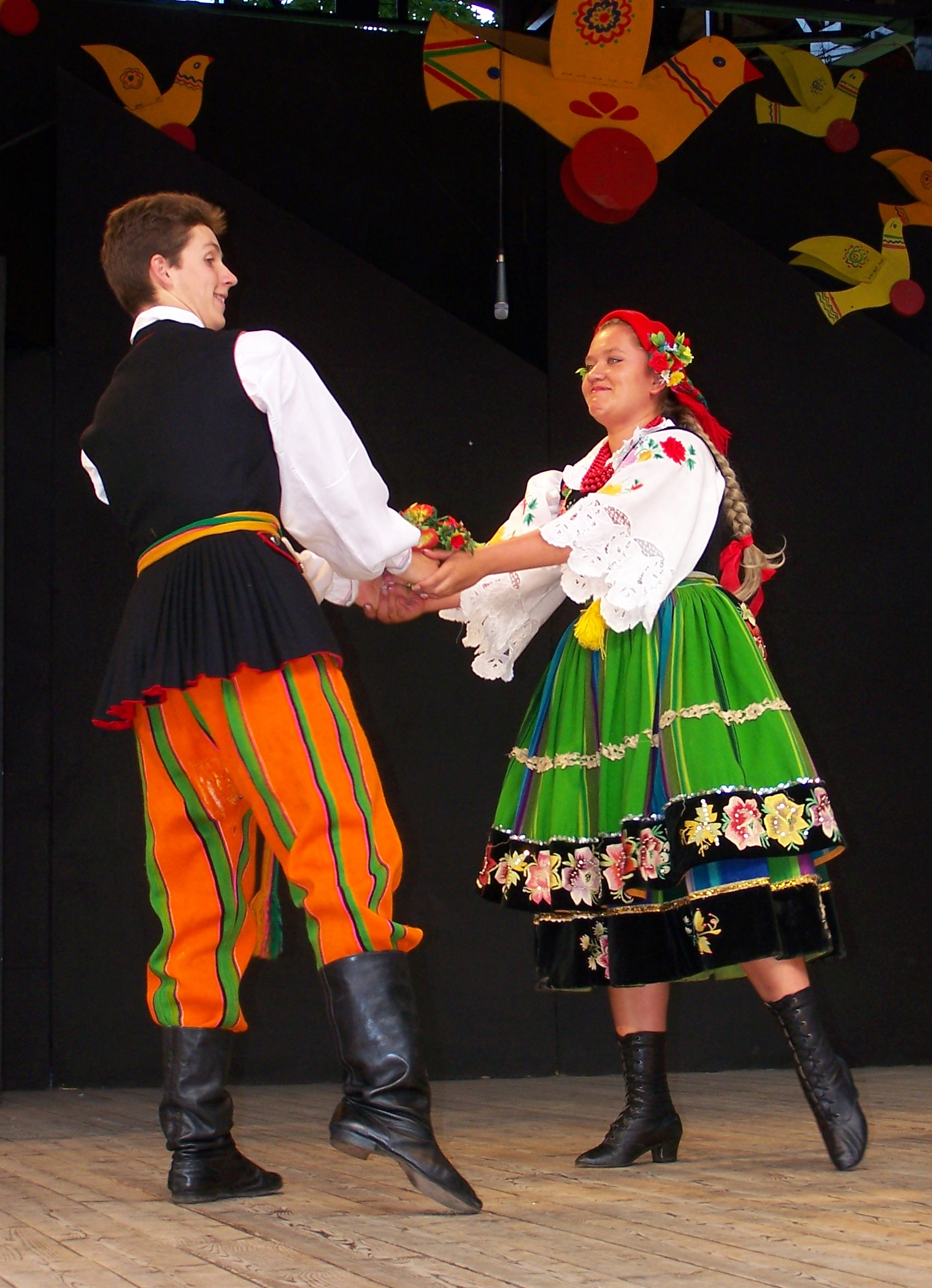 Występ zespołu Beskid z Bielska-Białej podczas 43. Tygodnia Kultury Beskidzkiej w Żywcu.